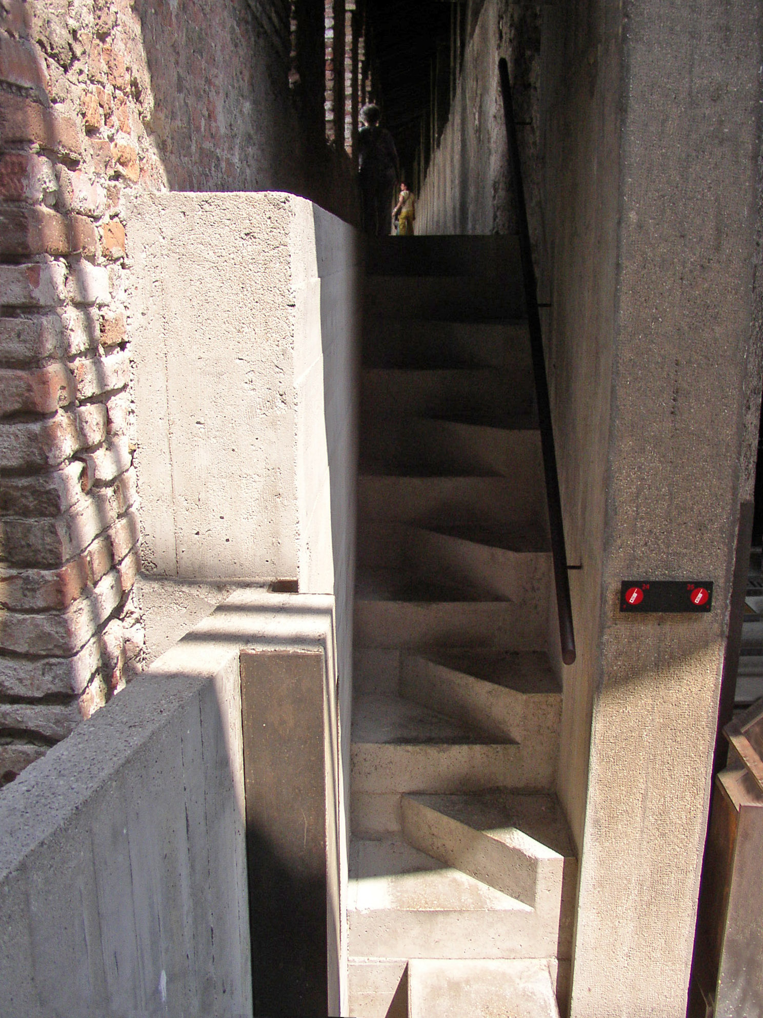 Io sono l'autore dell'immagine. Immagine scattata il 23.07.2004. L'immagine rappresenta la scala sfalsata di accesso al passaggio semicoperto in Castelvecchio a Verona realizzata da Carlo Scarpa.